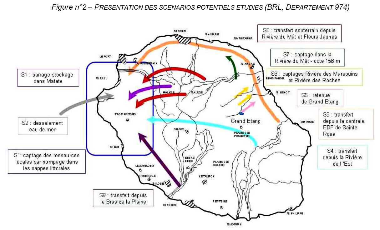 Carte schématique des scénarios potentiels afin de répondre aux besoins en eau de l'ouest de l'île - page 2 etude d-impact